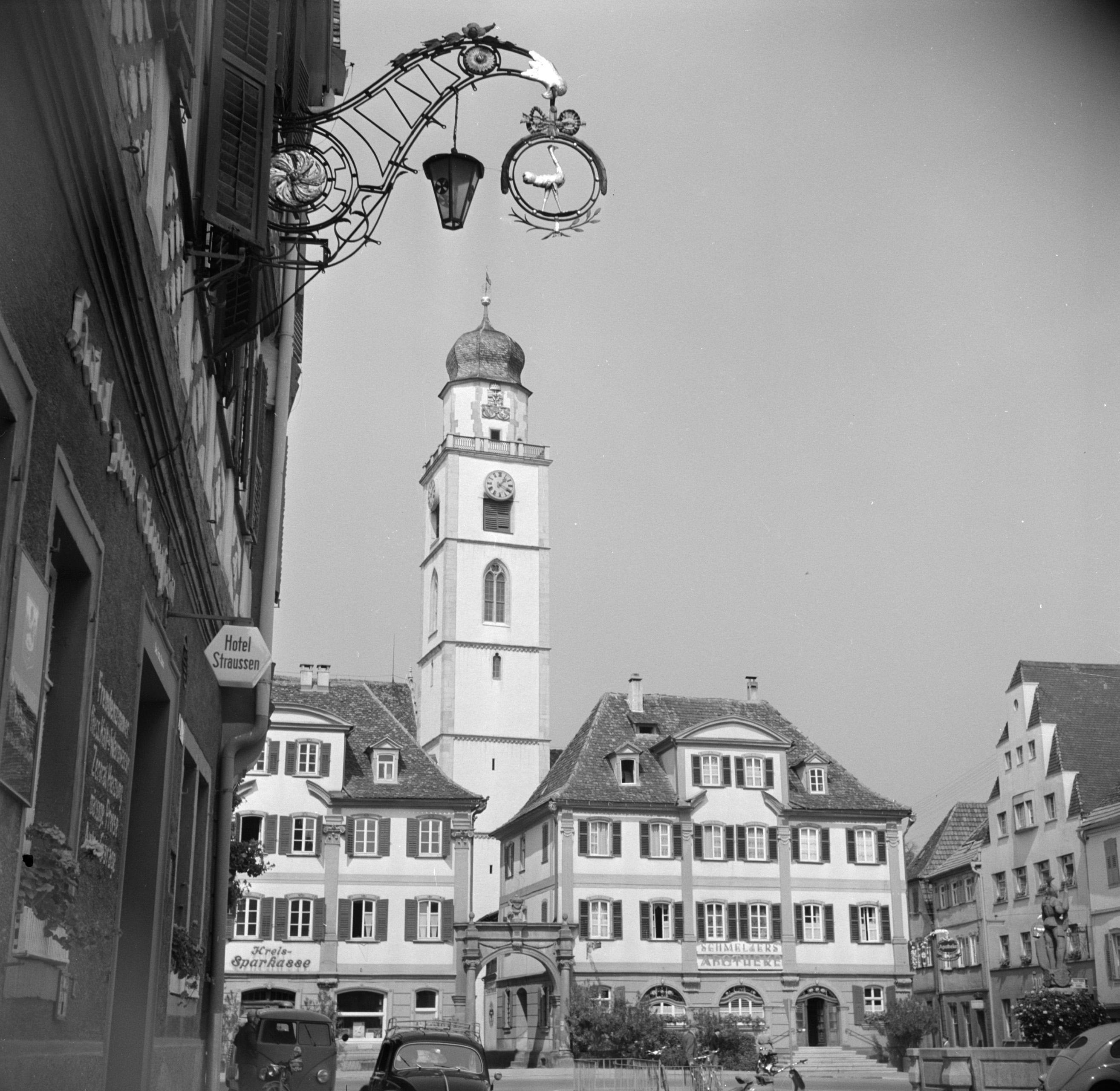 Collectie / Archief : Fotocollectie Van de Poll Reportage / Serie : Hohenloher Land Beschrijving : Marktplein met de tweelinghuizen en de toren van de St. Johanneskerk Datum : september 1953 Locatie : Bad Mergentheim, Baden-Württemberg, Duitsland, West-Duitsland Trefwoorden : kerkgebouwen, stadsbeelden, torens, woningen Fotograaf : Poll, Willem van de Auteursrechthebbende : Nationaal Archief Materiaalsoort : Negatief (6x6) Nummer archiefinventaris : bekijk toegang 2.24.14.02 Bestanddeelnummer : 254-3159